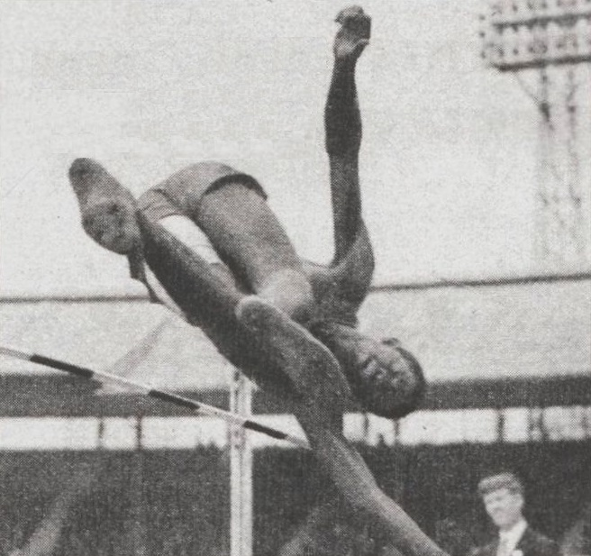 Pape Gallo Thiam, à la fin des années 1940.